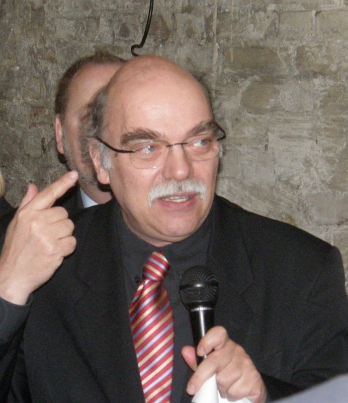 Andreas Nachama während der Eröffnung des Gedenkortes "SA-Gefängnis Papestraße" am 7. April 2011 in Berlin-Tempelhof